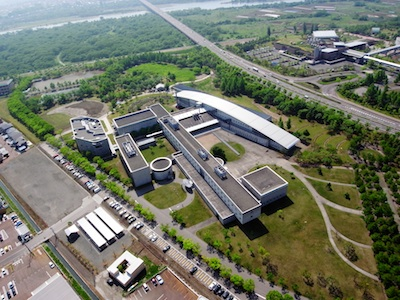 キャンパス全景